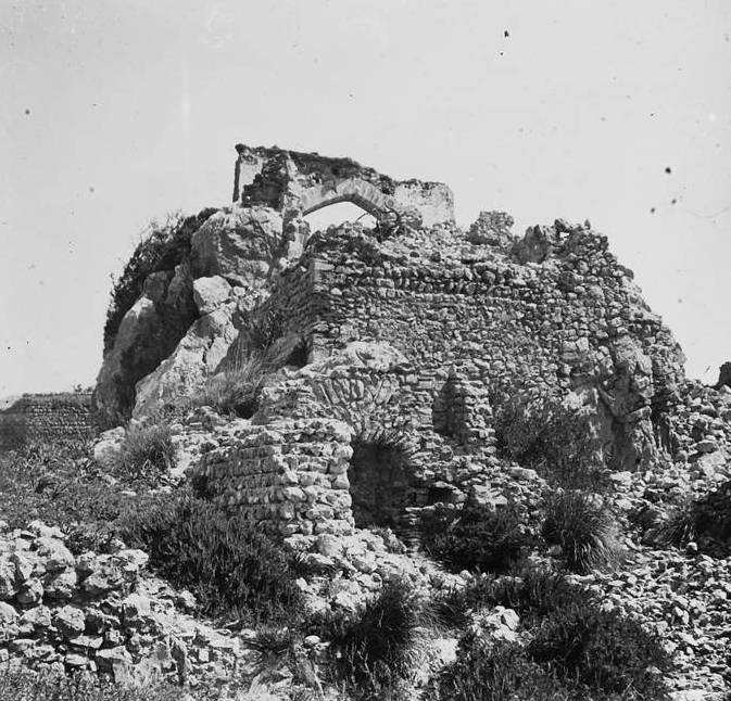 Arc i ruïnes del castell del Rei de Pollença. Josep Salvany i Blanch (1915)